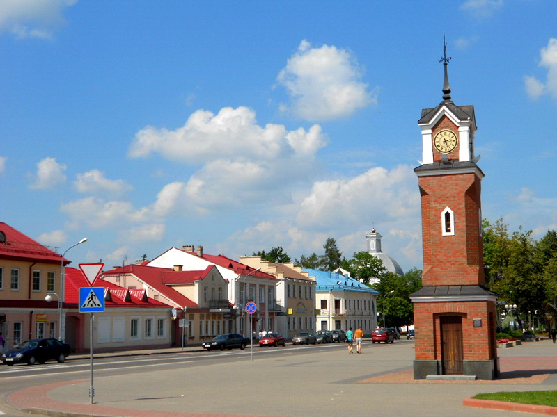 Шчучын. Плошча Свабоды